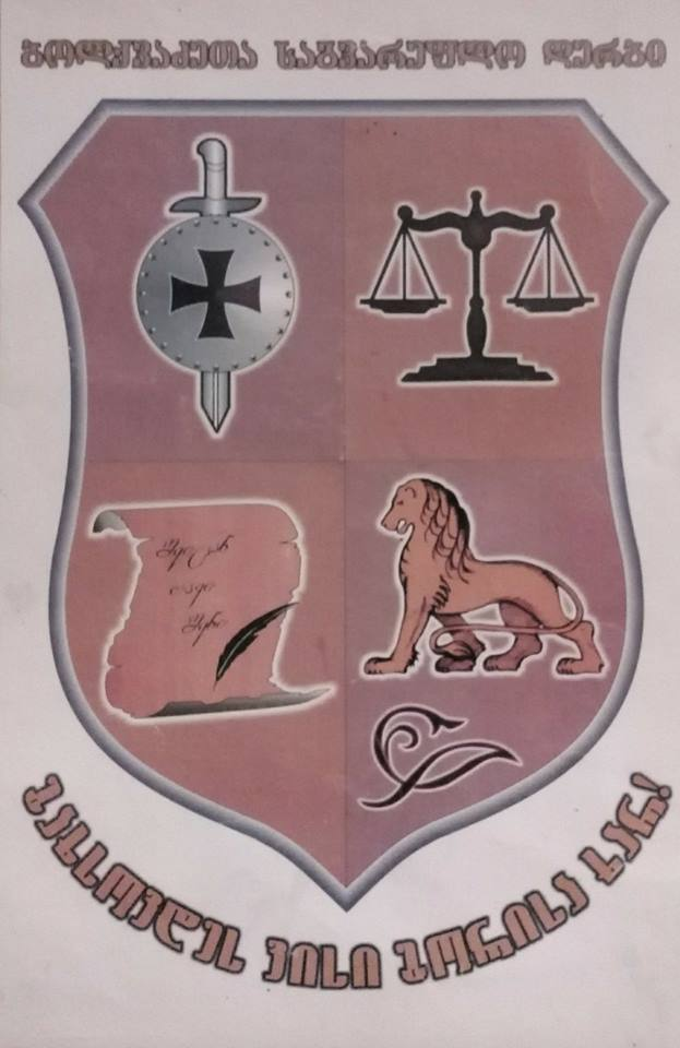 ბოლქვაძეების საგვარეულო გერბი